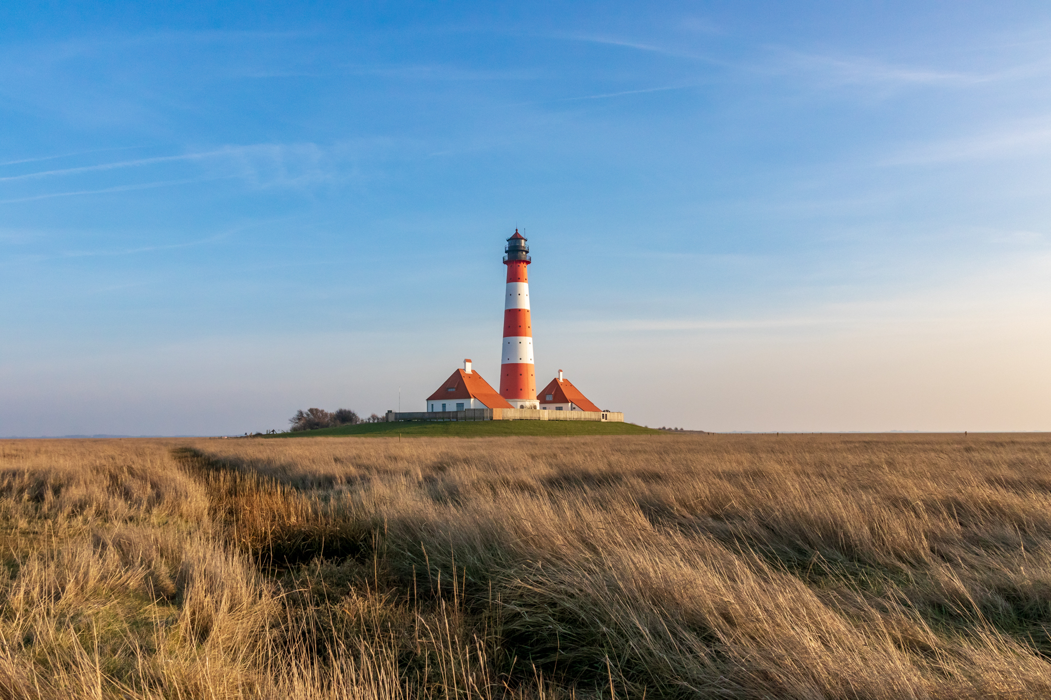 Abendstimmung am Leuchtturm Westerheversand im NSG Nordfriesisches Wattenmeer